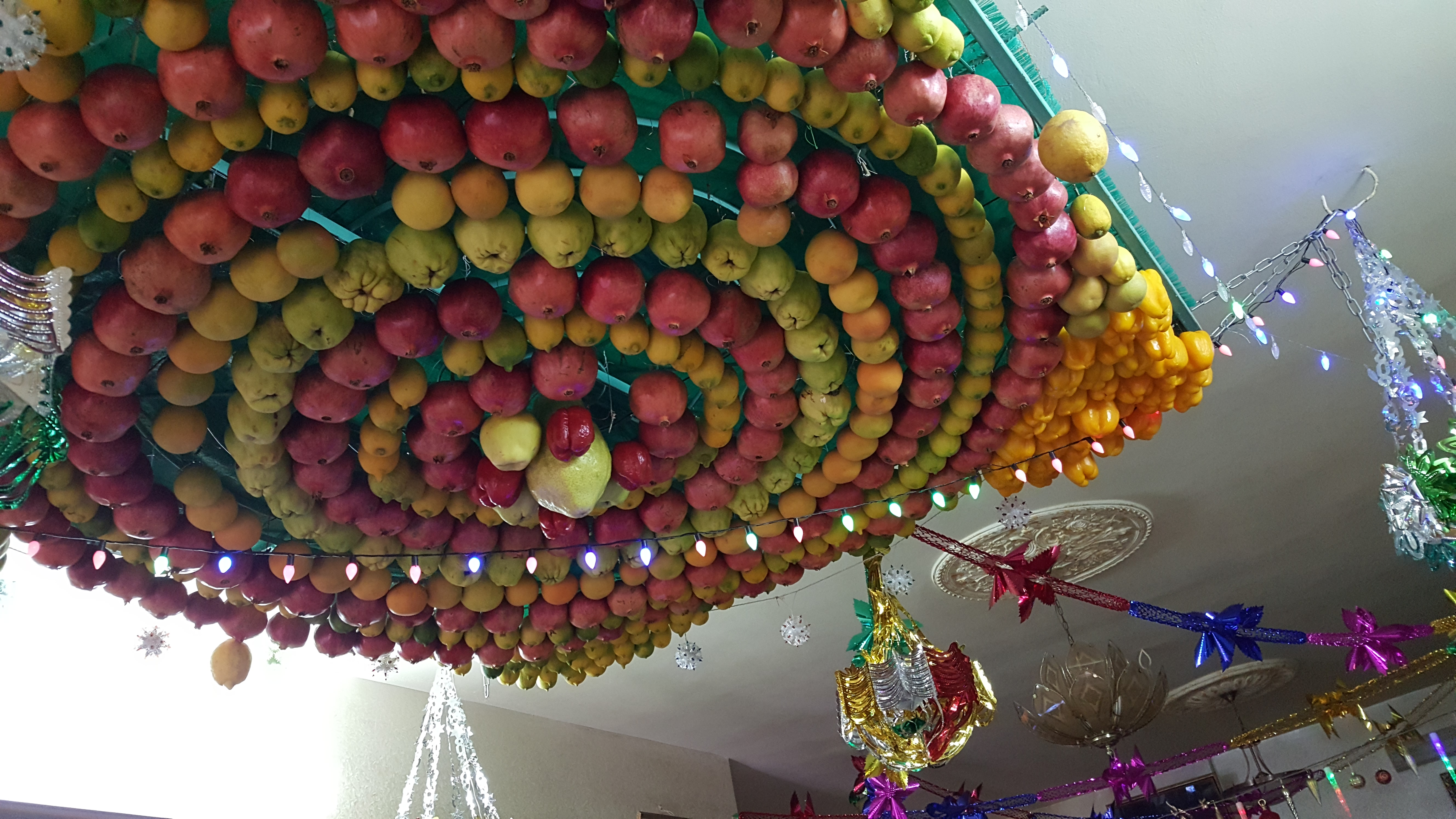 סוכות השומרונים בהר גריזים